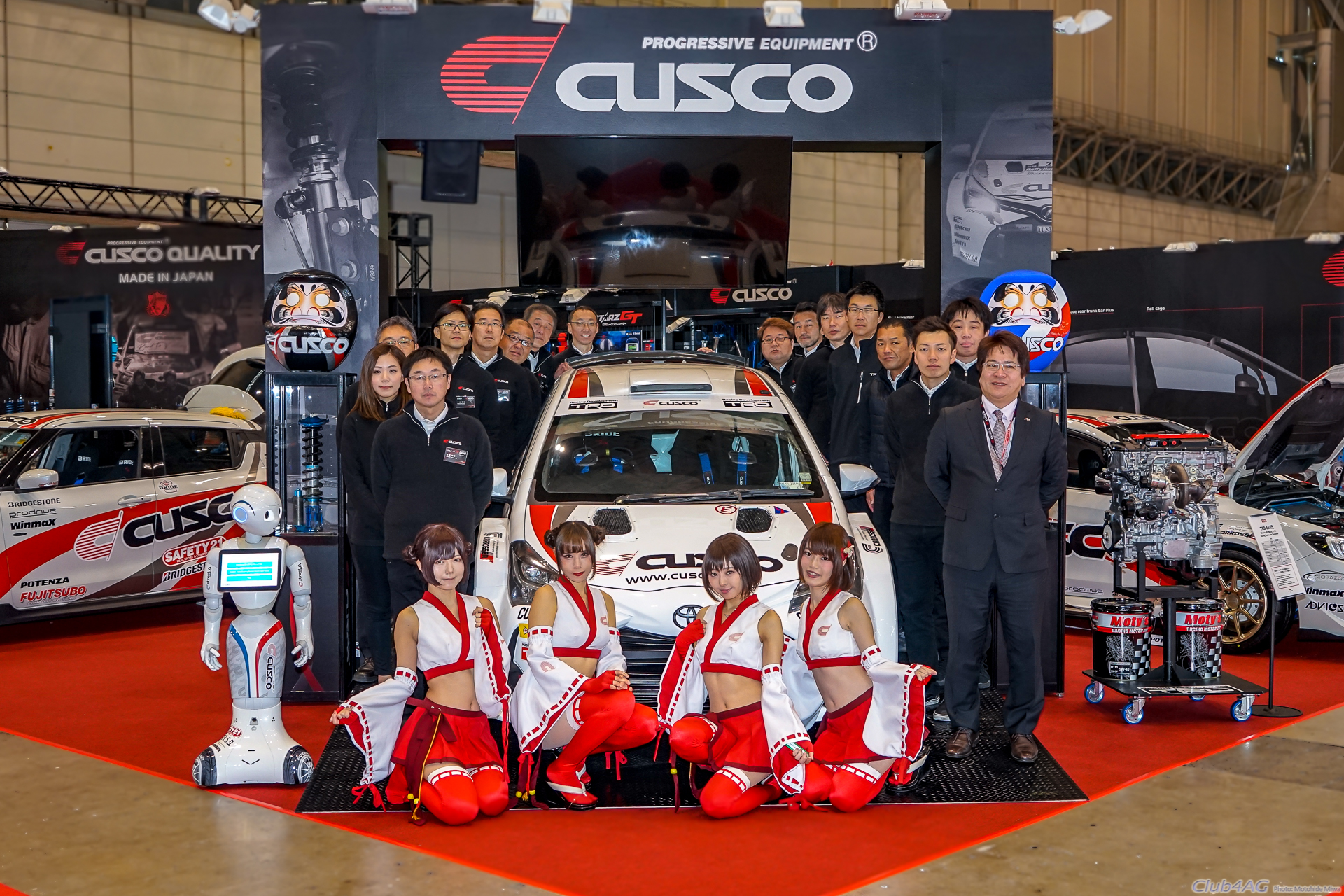 Tokyo Auto Salon 2019